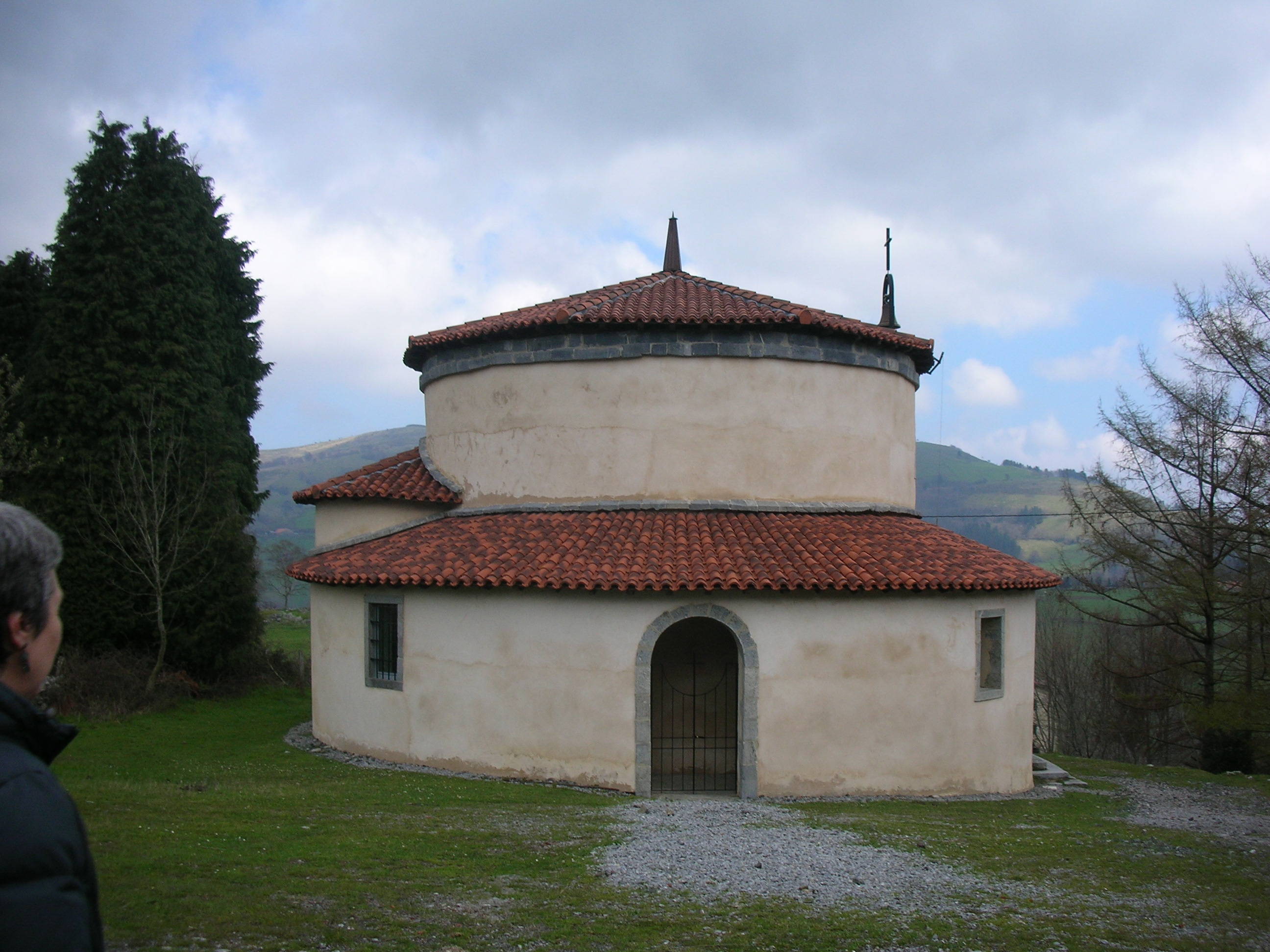 Errezilgo Erdoizta auzoko eliza. Agian Gipuzkoako eliza biribil bakarra da